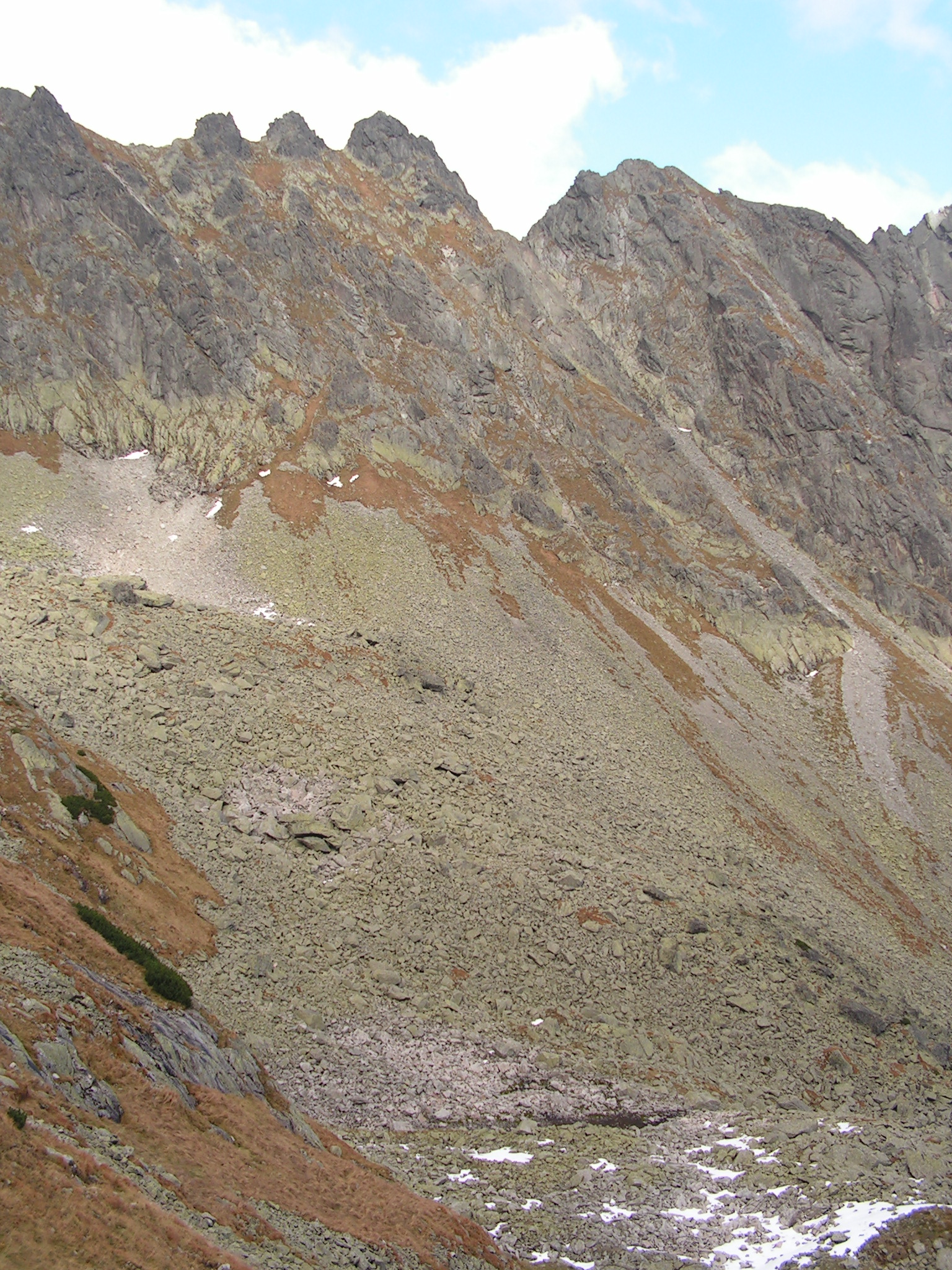 Żółte Kopki i Kozia Kopka w Koziej Grani. W dole Jagnięcy Stawek.